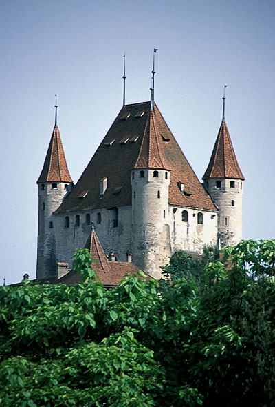 Das Schloss Thun